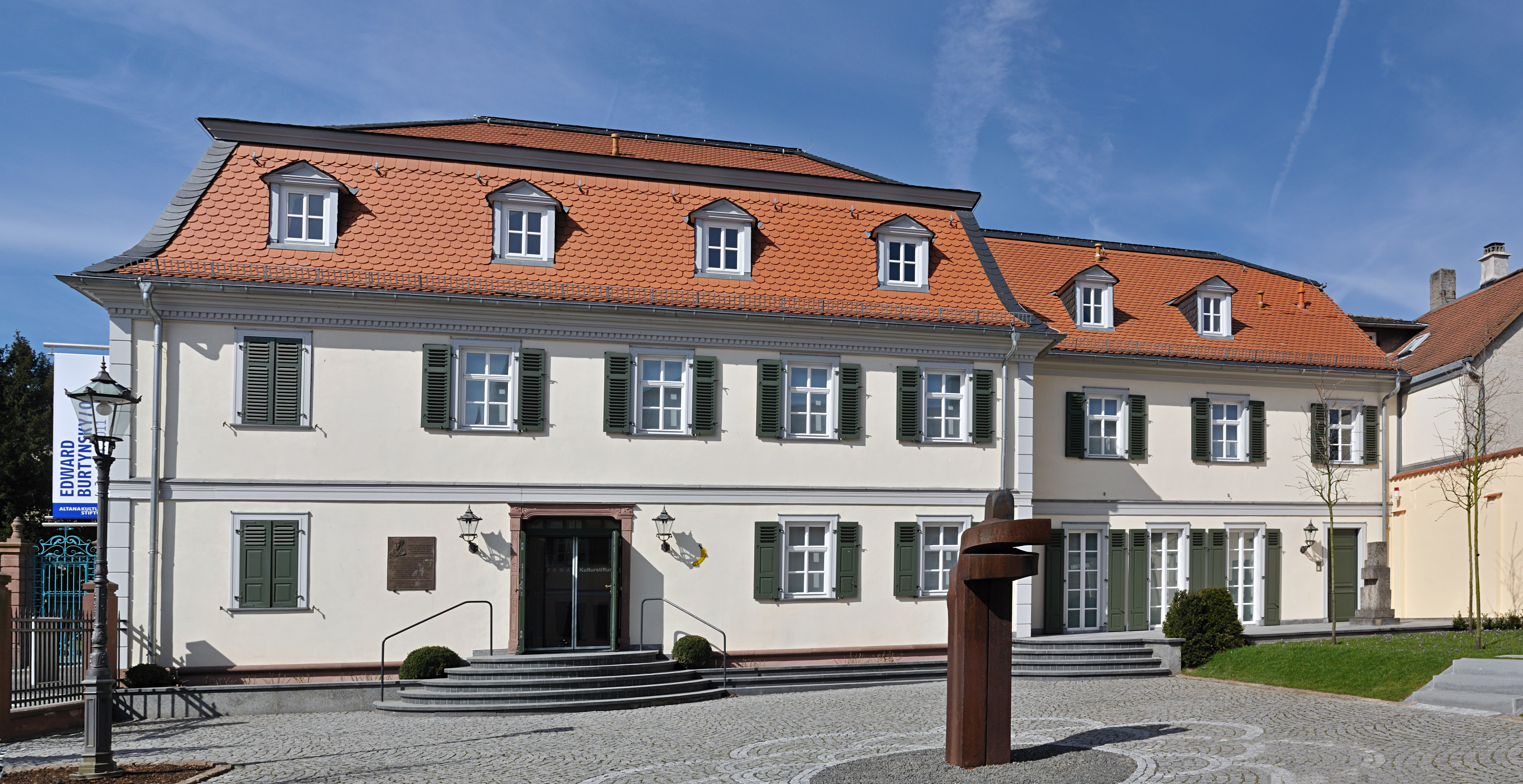 Sinclair-Haus in Bad Homburg vor der Höhe Panoramasicht vom Hof, im Vordergrund Eduardo Chillidas Skulptur „Besarkada X“ aus dem Jahr 1996